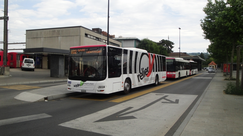 Bus MAN de la société TRAVYS immatriculé VD 550 090 stationne à la gare CFF d'Yverdon-les-Bains en attendant son départ sur la ligne 602 en direction de Montagny Village. Ce bus à été pelliculé pour la promotion du nouveau réseau urbain mis en place le 12 décembre 2010 dans le cadre du projet d'agglomération yverdonnoise, AggloY.